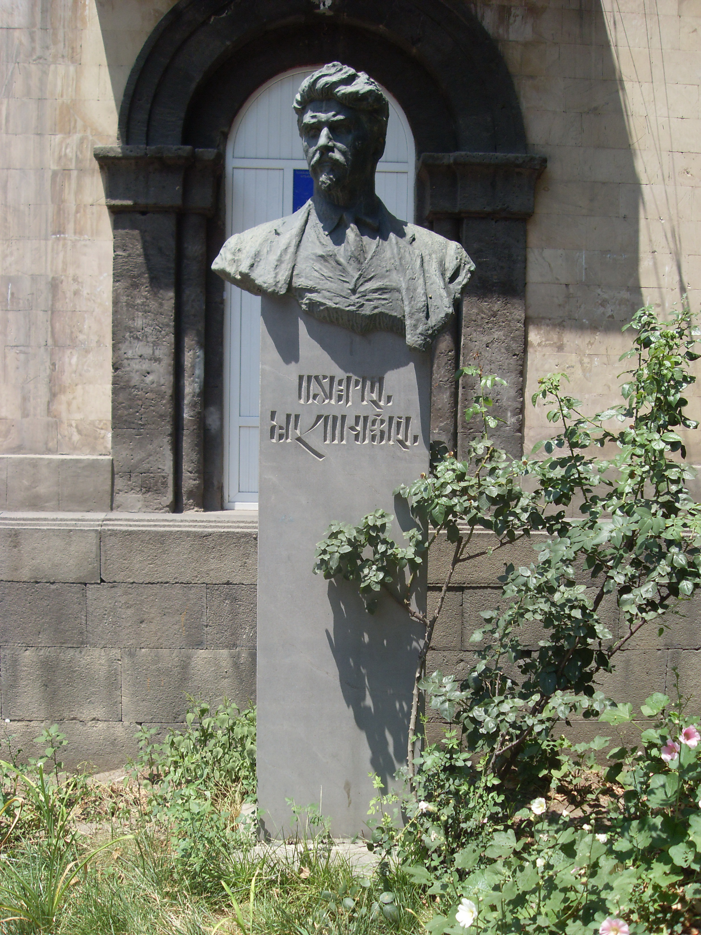 Ստեփան Շահումյանի արձանը նրա անվան դպրոցի առջև, ք. Երևան, Կենտրոն